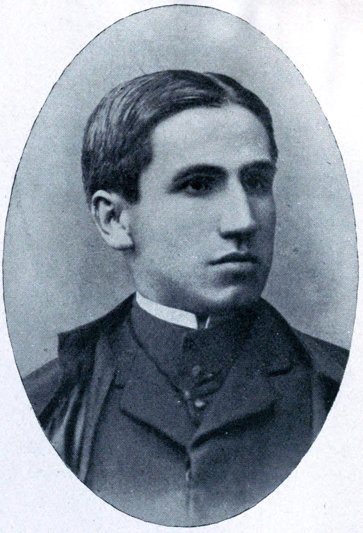 Luis Felipe Contardo Palma (1880, Molina, Chile; 1922, Chillán, Chile) fue un sacerdote católico y escritor de poemas religiosos.